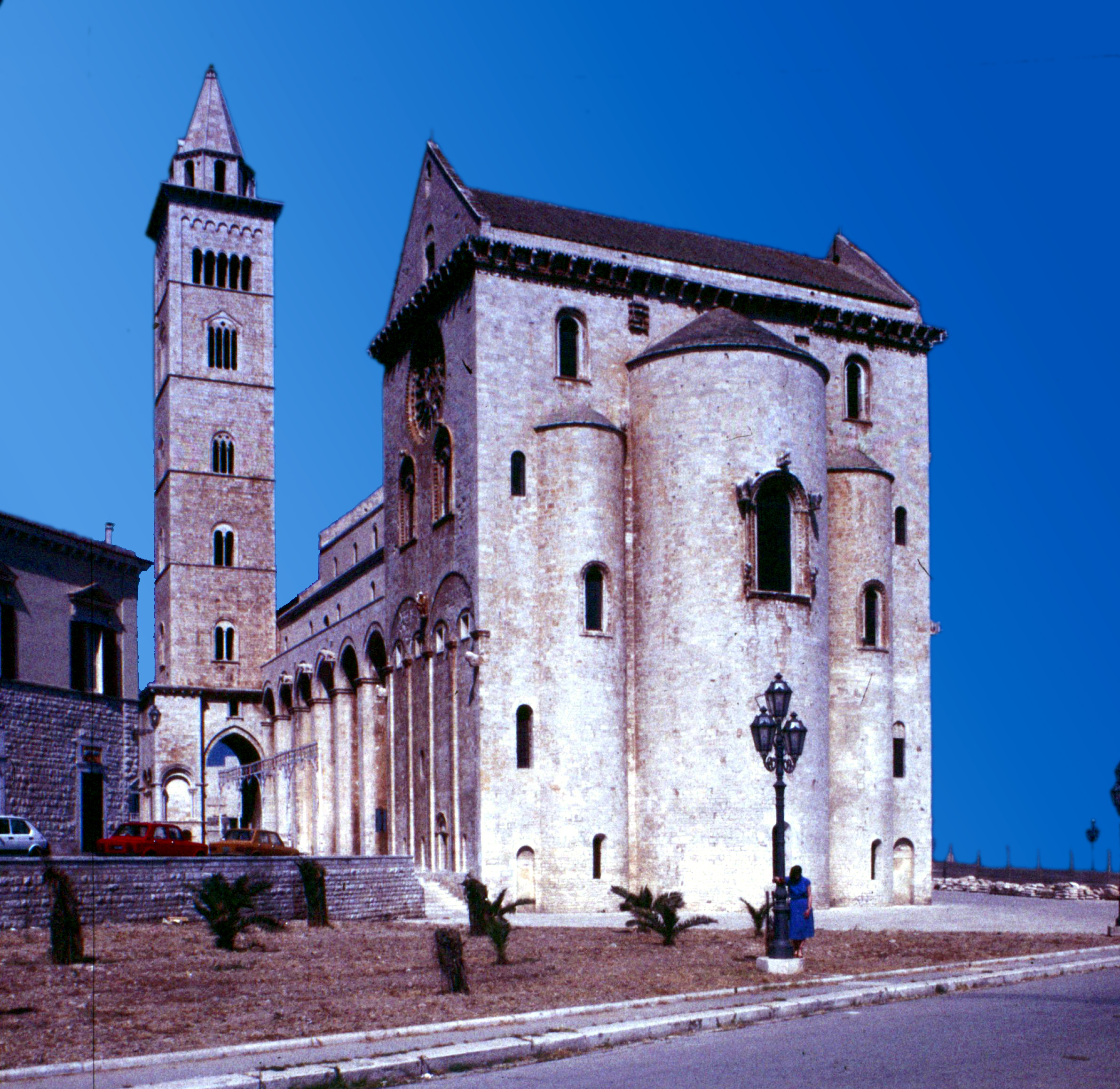 Dom von Trani in Apulien